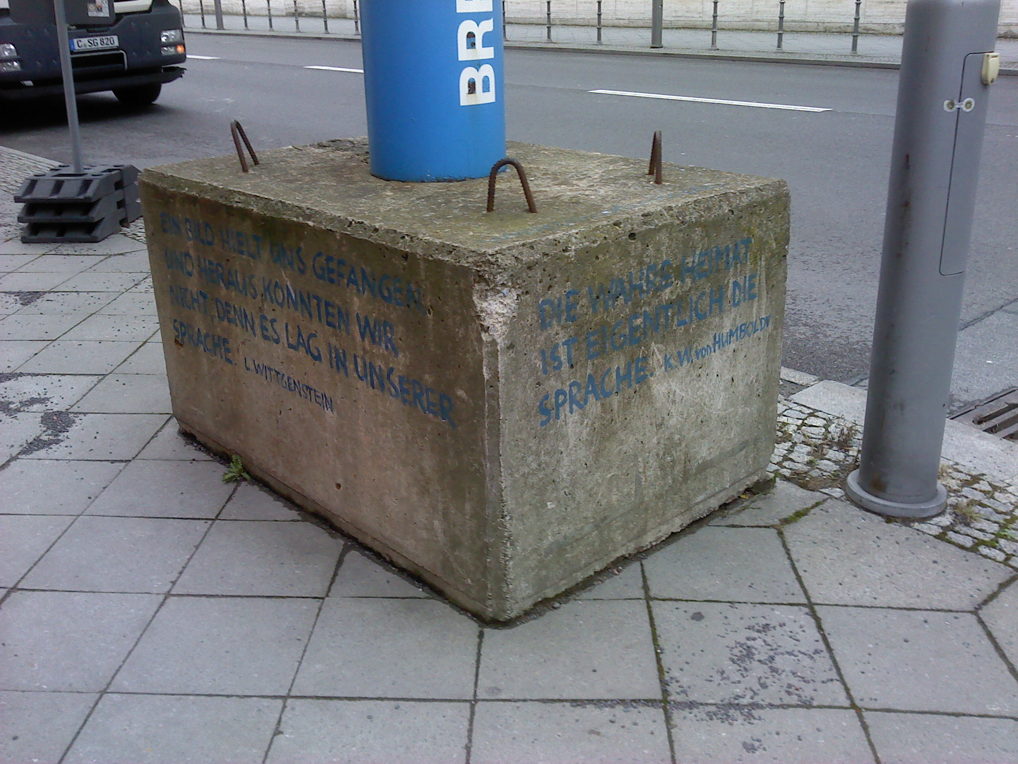 Berlin-Mitte. Französische Straße, Straßenkunst von Wolfgang Nieblich